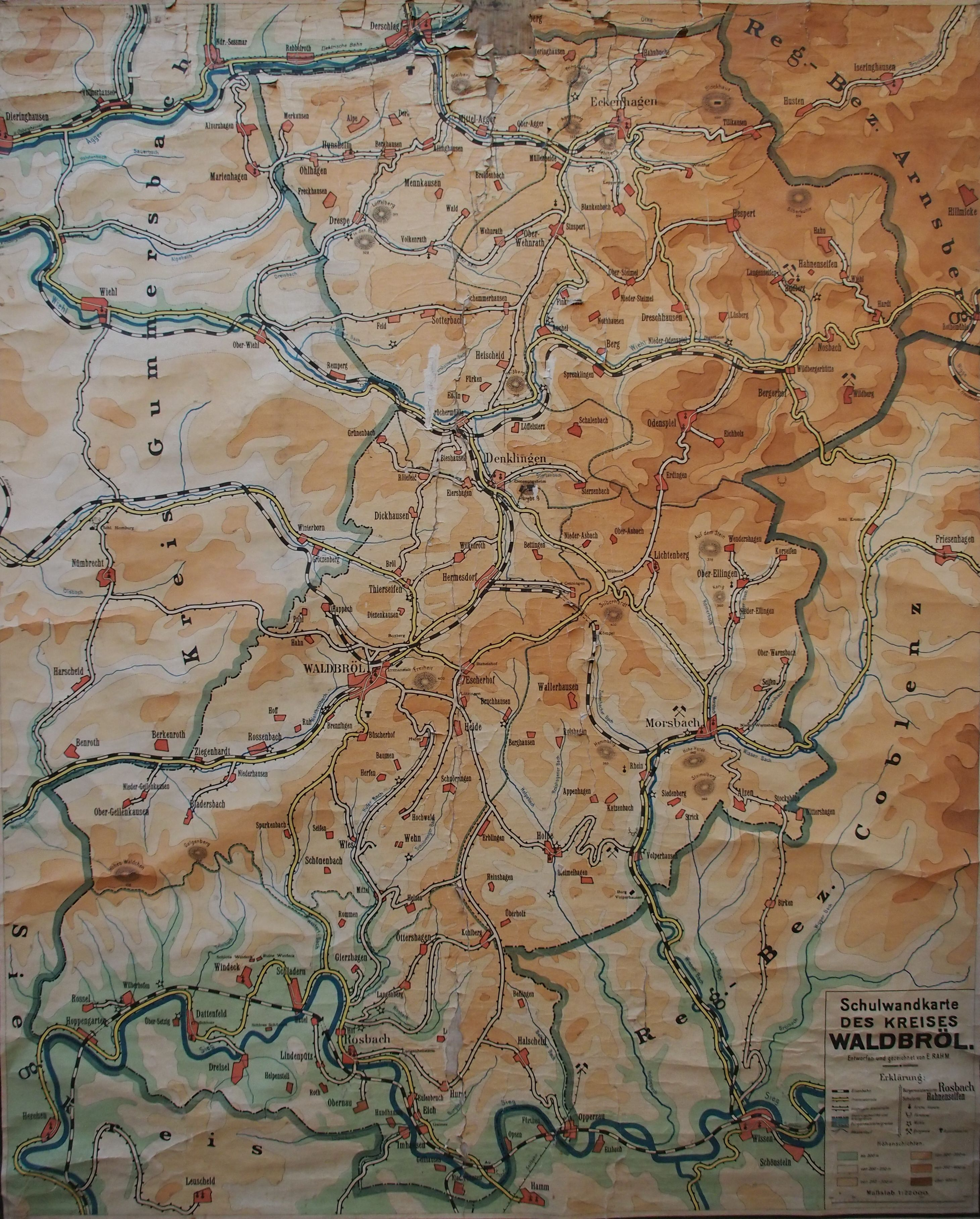 Foto einer Schulwandkarte vom Kreis Waldbröl aus den 1960er Jahren